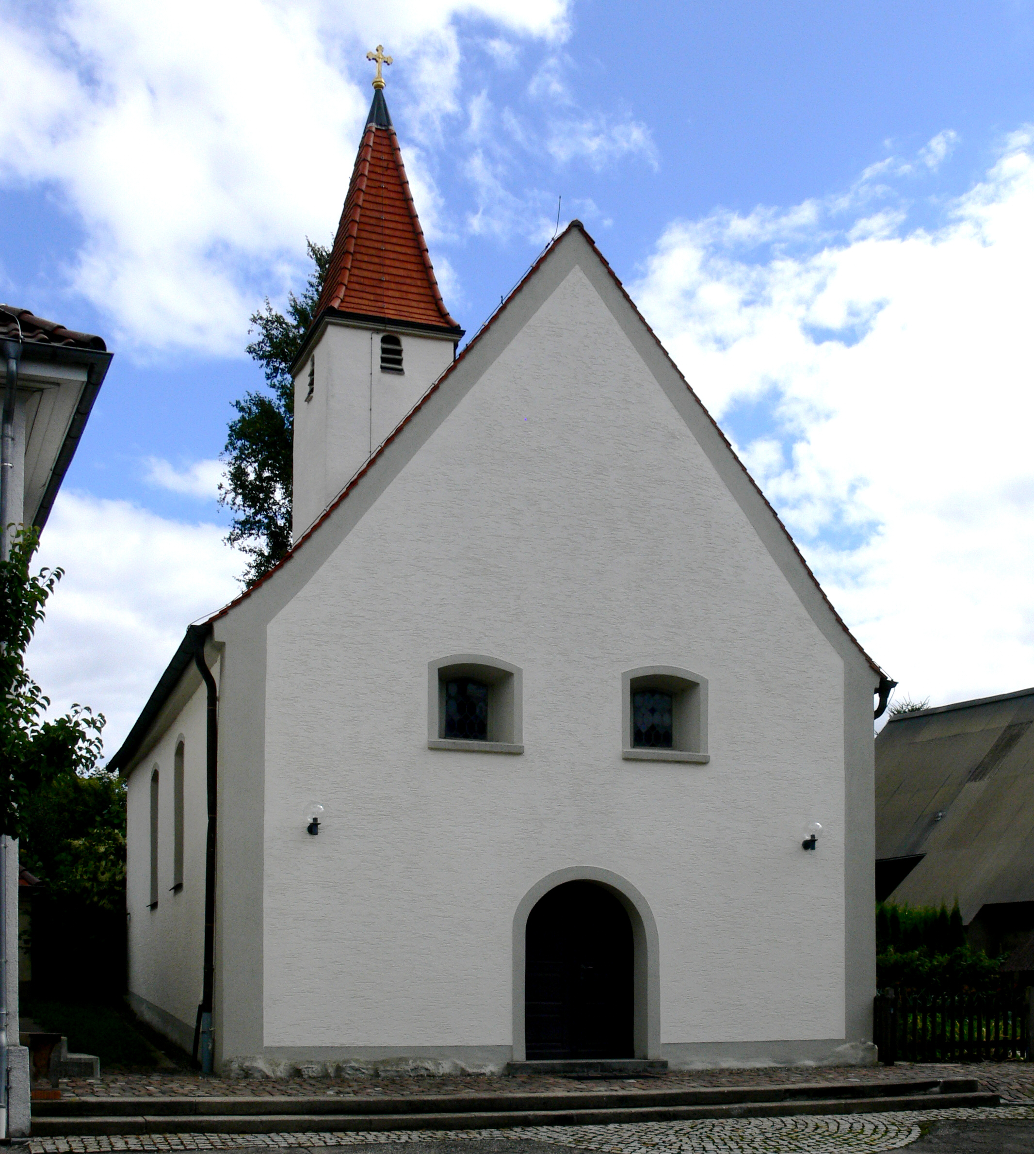 Musbach, Gemeinde Ebersbach-Musbach, Landkreis RavensburgKapelle